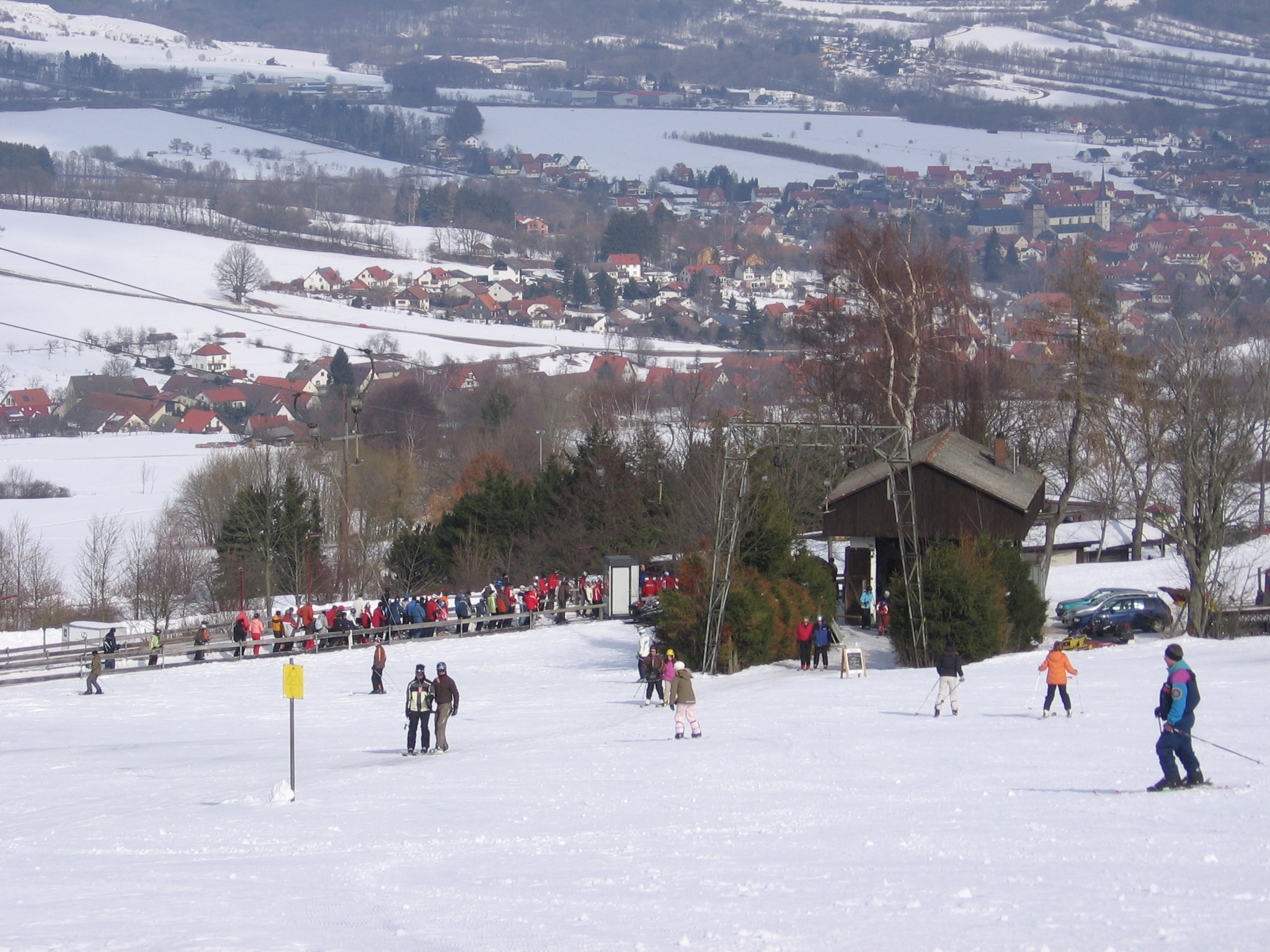 Dreitannenlift am Kreuzberg